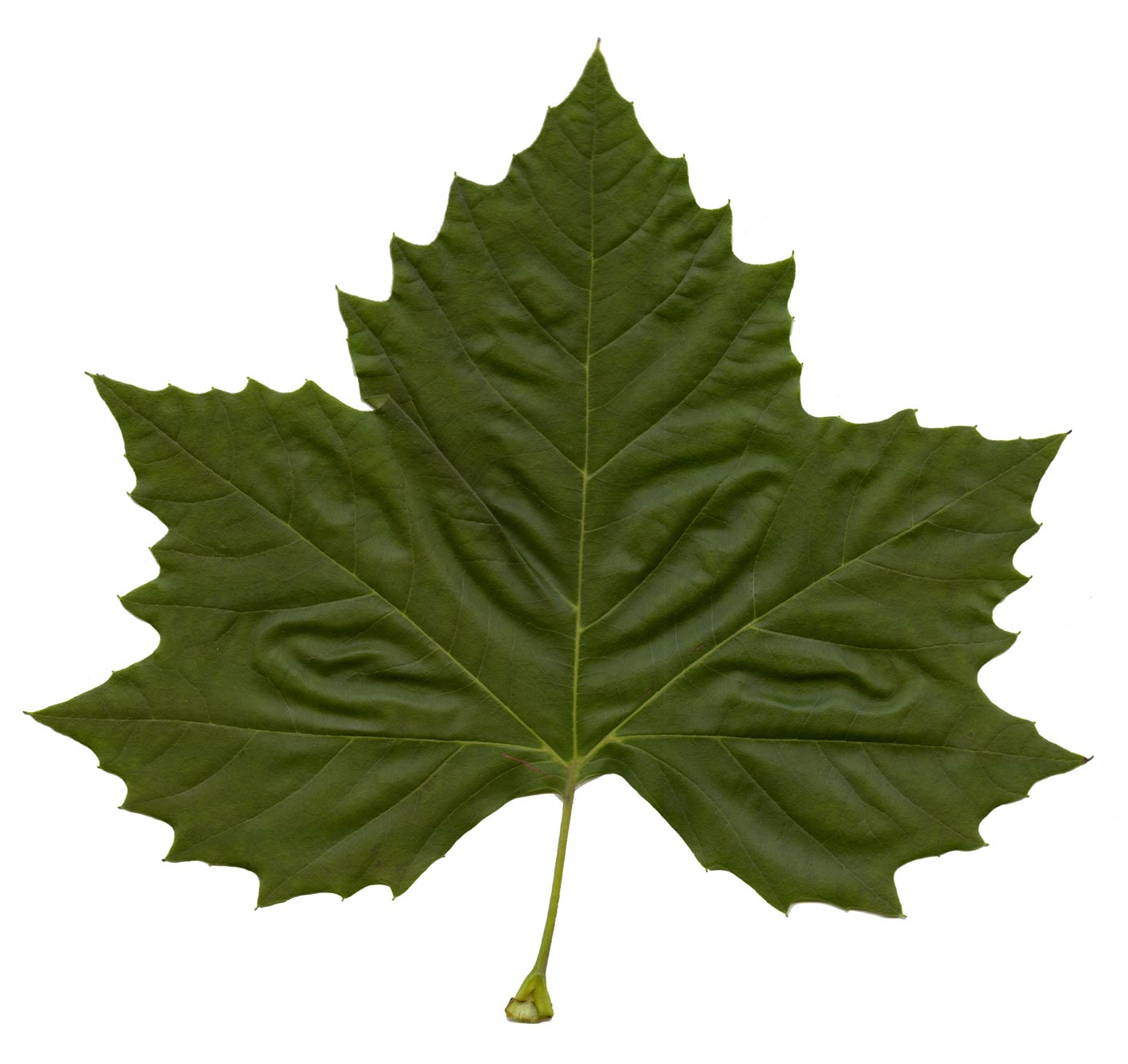 Blatt einer ahornblättrigen Platane